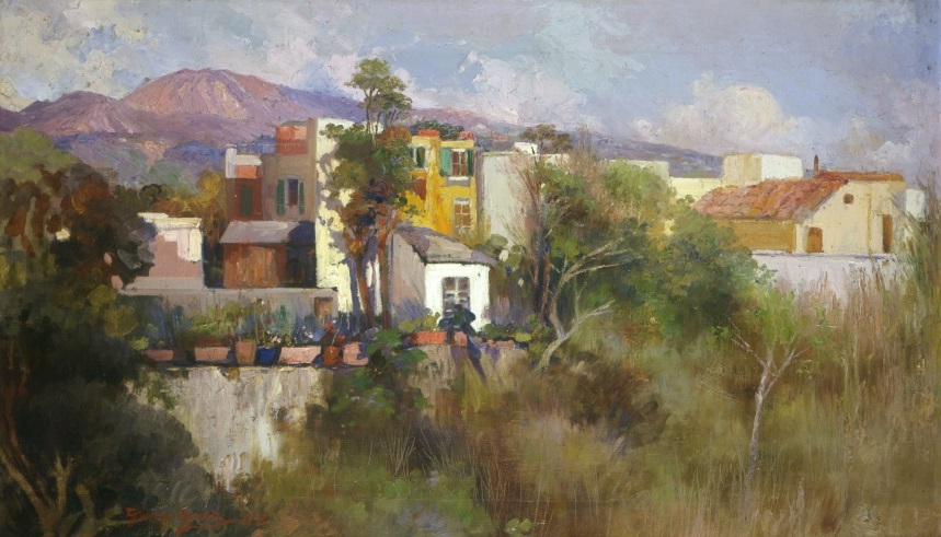 "Paesaggio vesuviano", olio su tela, collezione privata